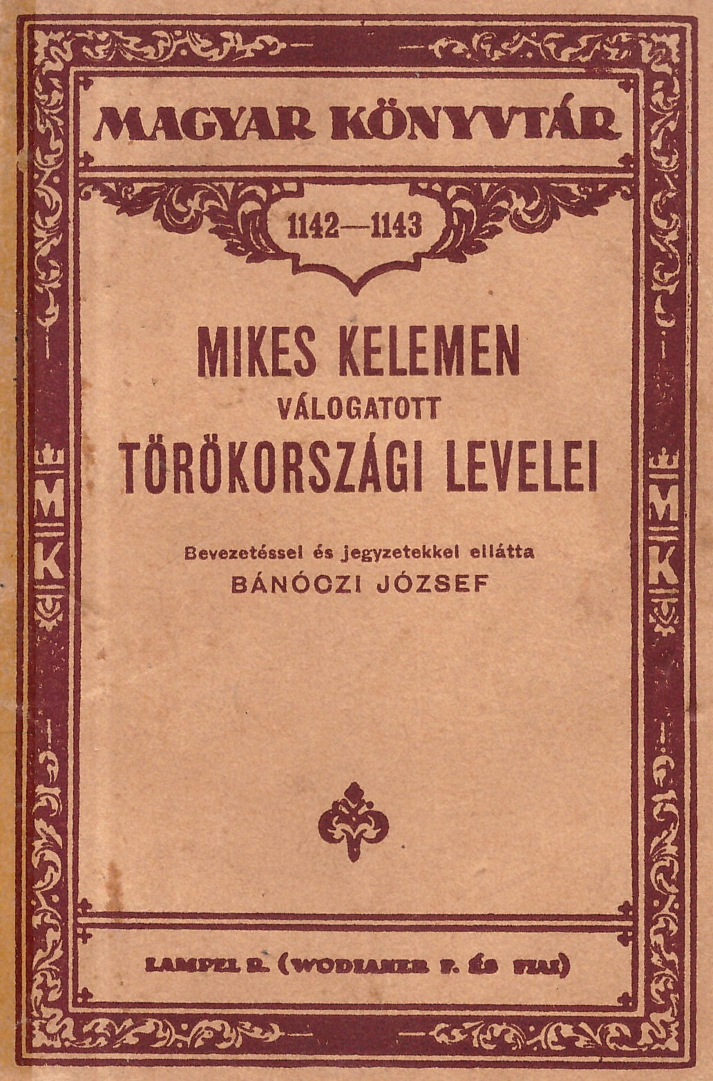 Mikes Kelemen (1690-1761) Török országi levelei (1910 körüli kiadás)